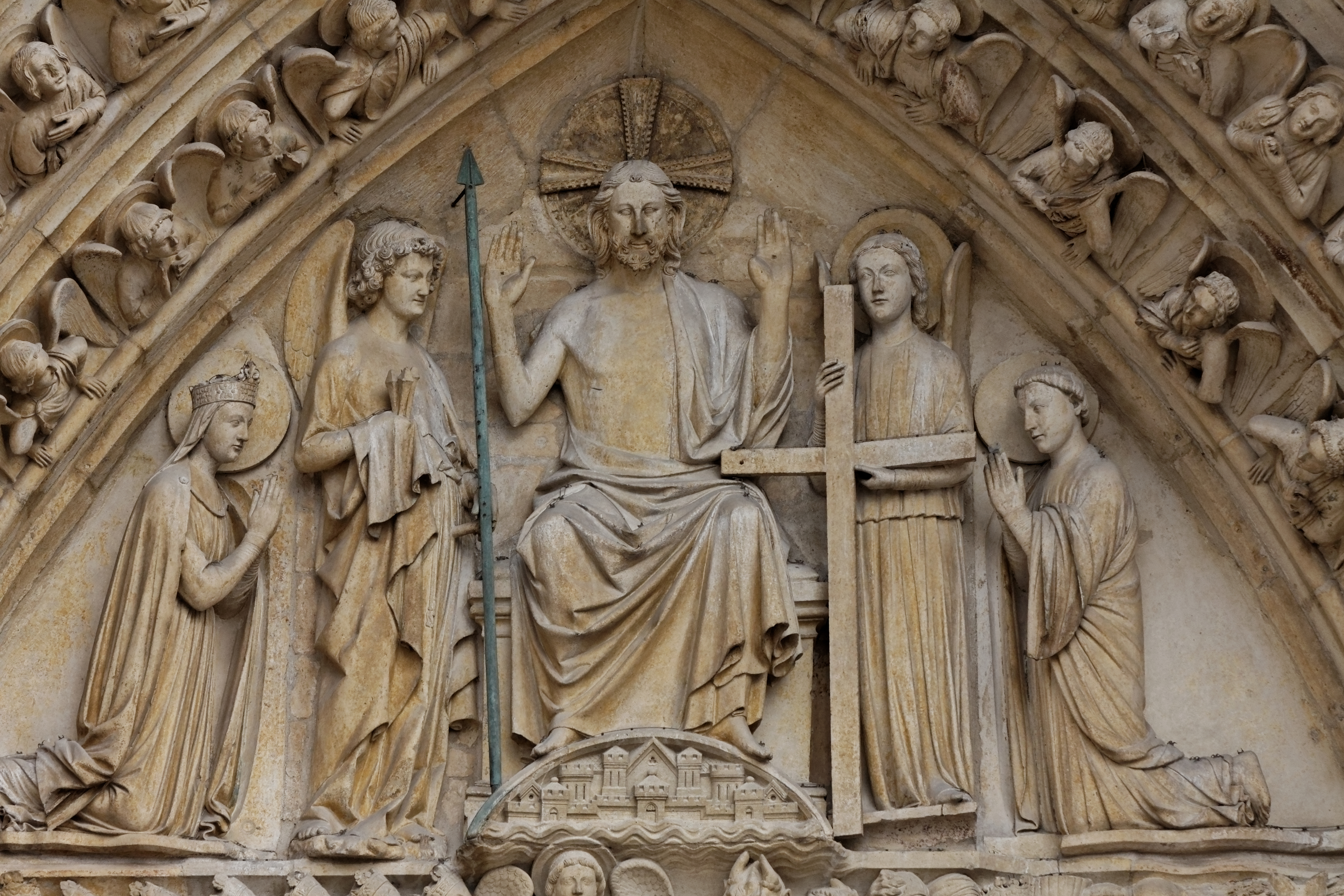 Vue d'un détail du portail du Jugement dernier sur la façade ouest de la cathédrale Notre-Dame de Paris.